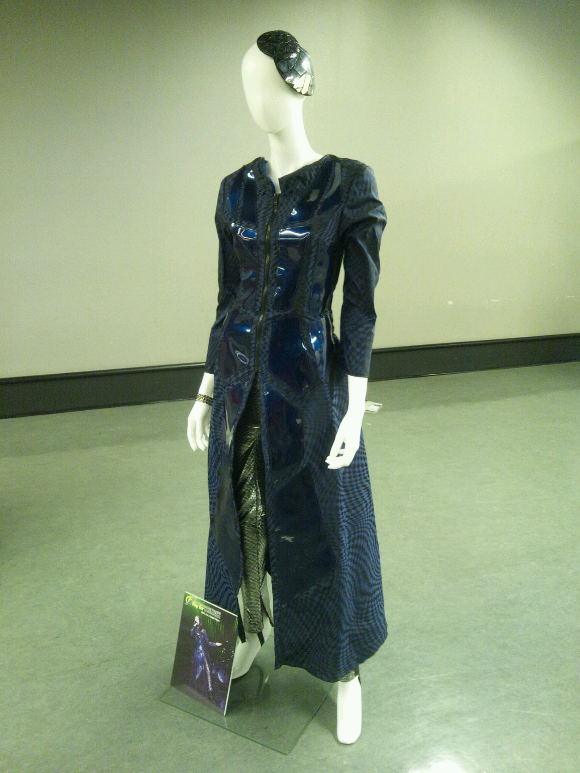 アニメロミックス Presents Minori Chihara Birthday Live 2012 supported by JOYSOUND 衣装展覧会より『Minori Chihara Live Tour 2011 〜Key for Defection〜』の衣装。